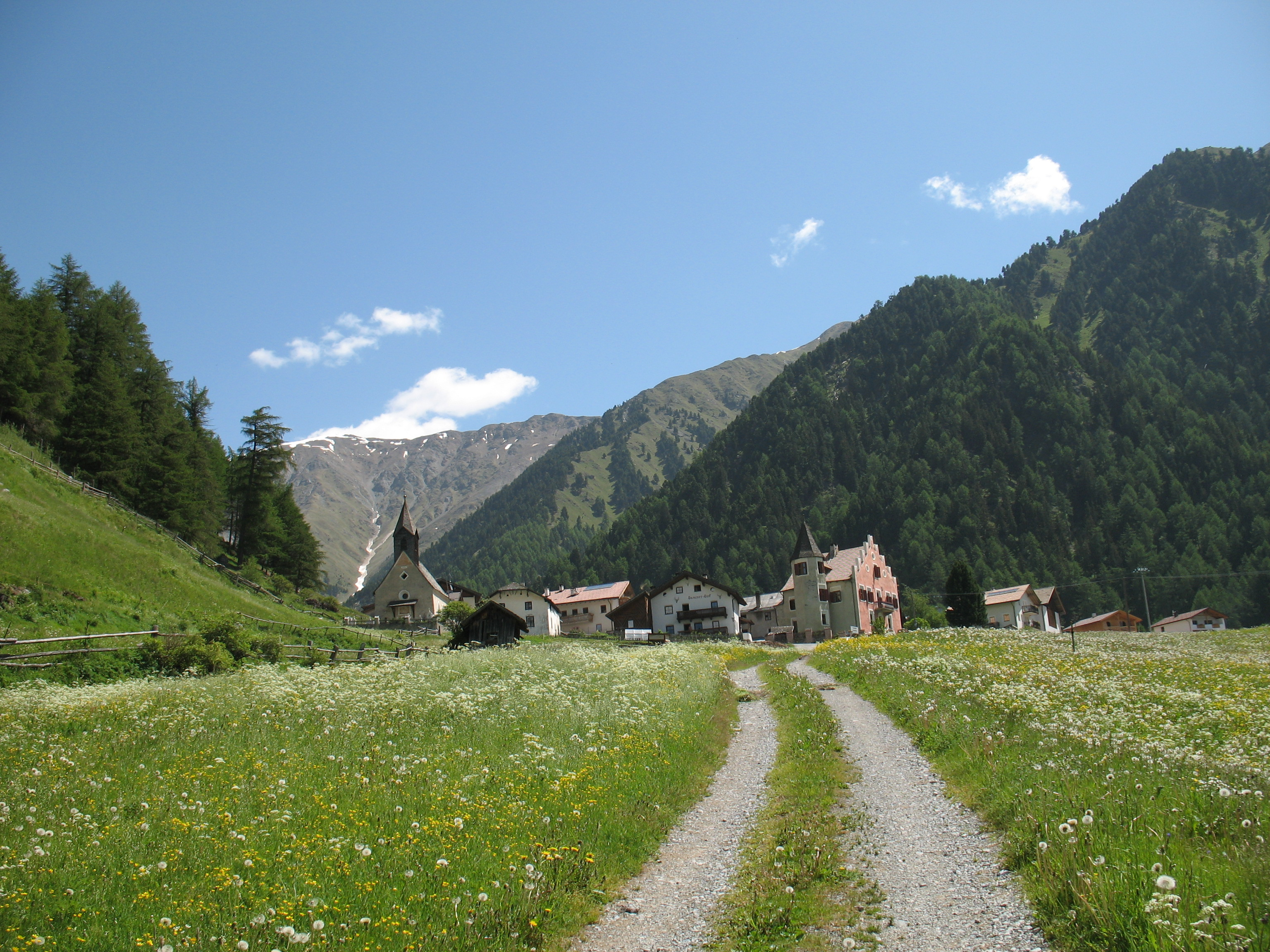 Ansitz Plawenn mit gleichnamigem Weiler